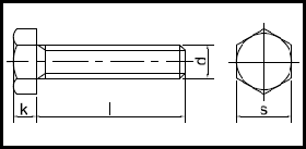 DIN 961